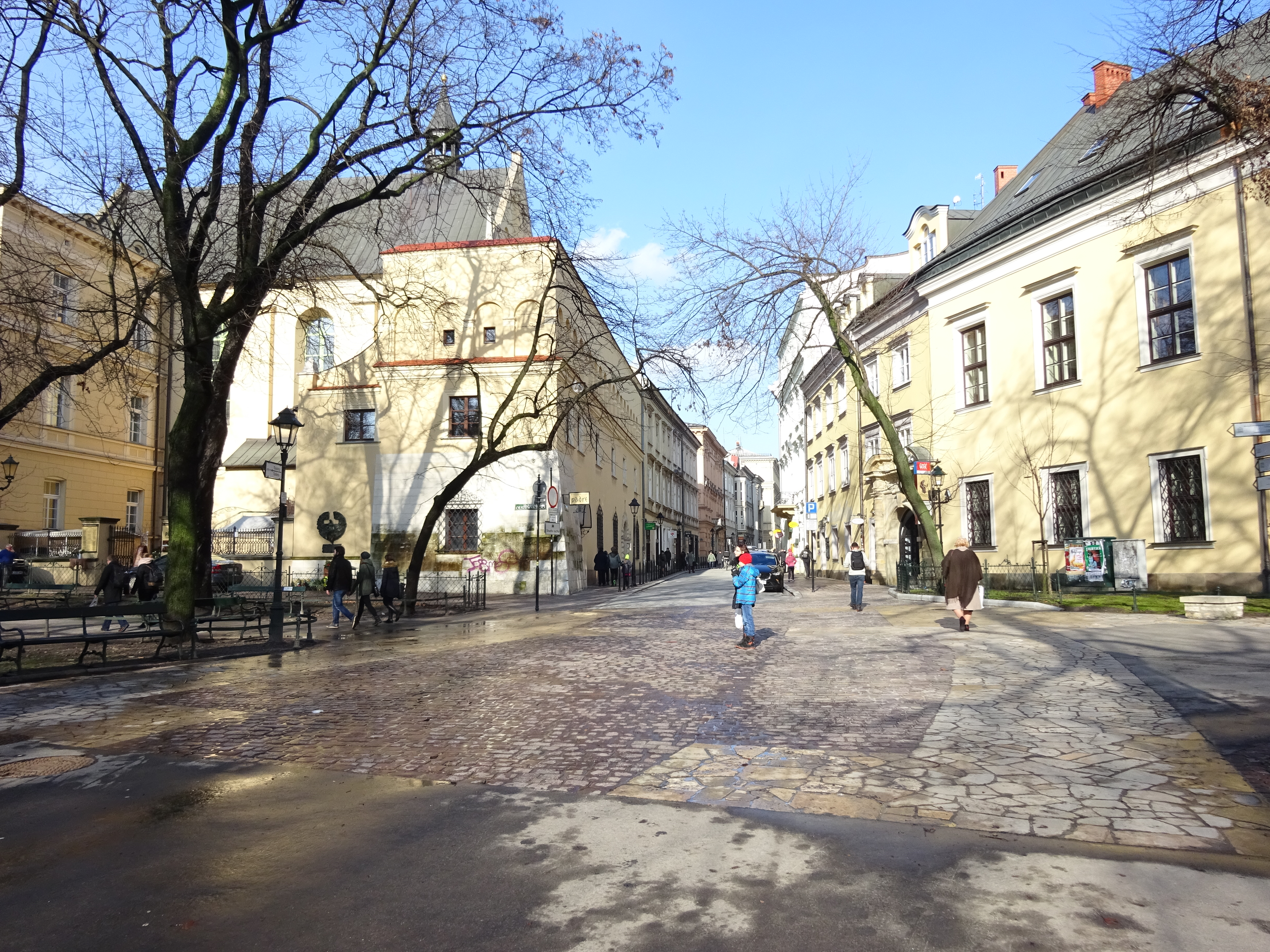 Miejsce, gdzie stała Brama Wiślna. Zarys murów bramy w alejce Plant. Wylot ul. Wiślnej, Kraków, 2016.